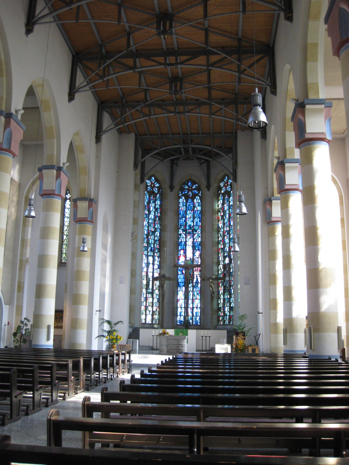 Chor der Herz-Jesu-Kirche (Osnabrück) mit der Kreuzigungsgruppe von Evert van Roden im Hintergrund